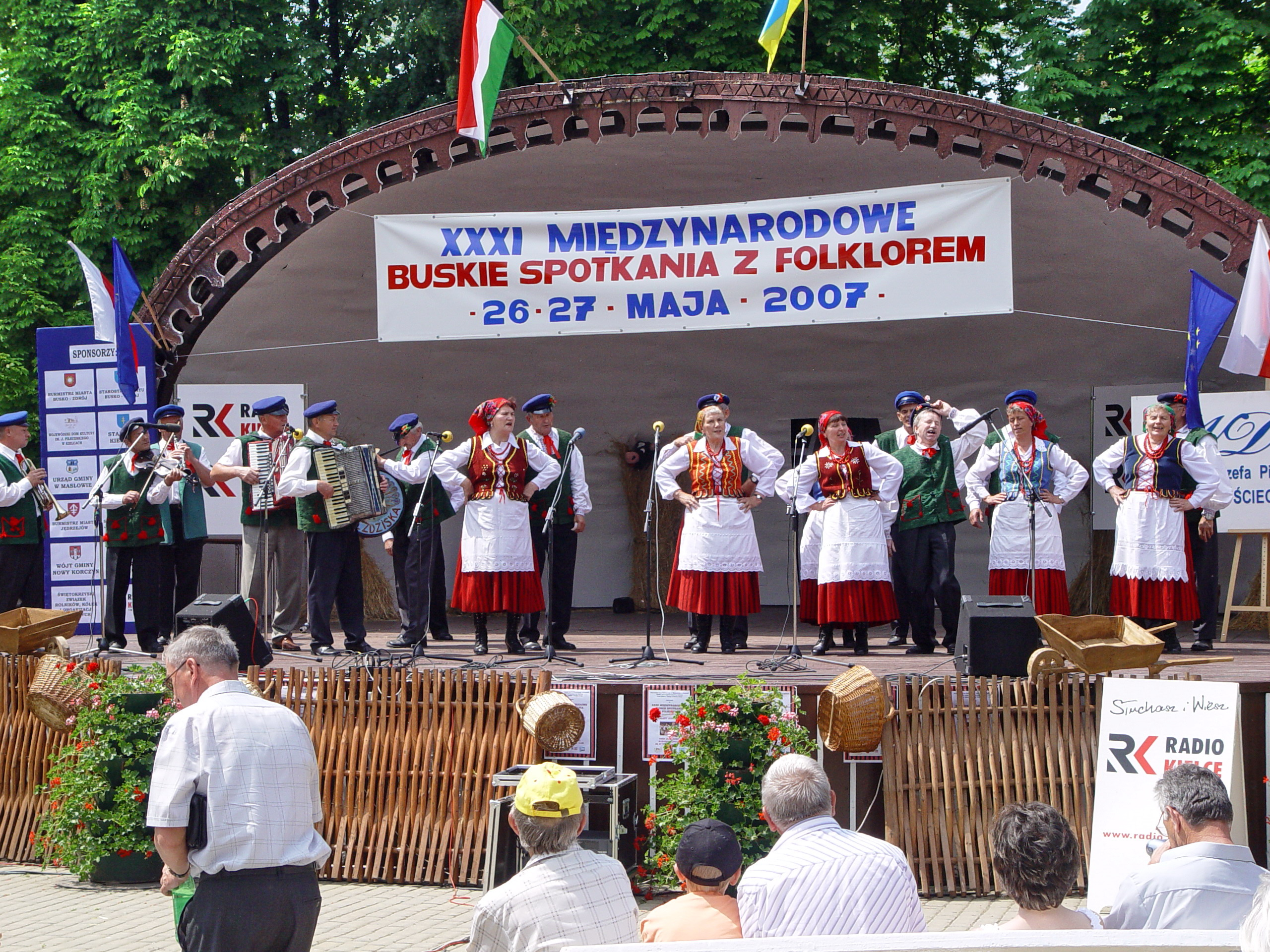 Buskie Spotkania z Folklorem, Zespół Ludowy "GNIEŹDZISKA" z Gnieździska k.Łopuszna